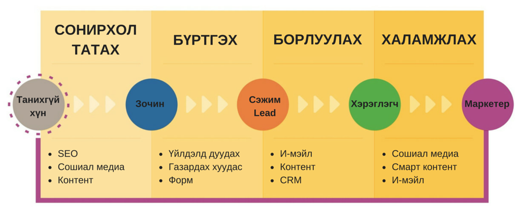 Монгол: Инбаунд маркетингийн аргачлал